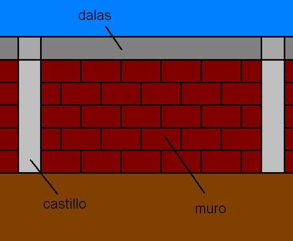 caracteristicas de la pared